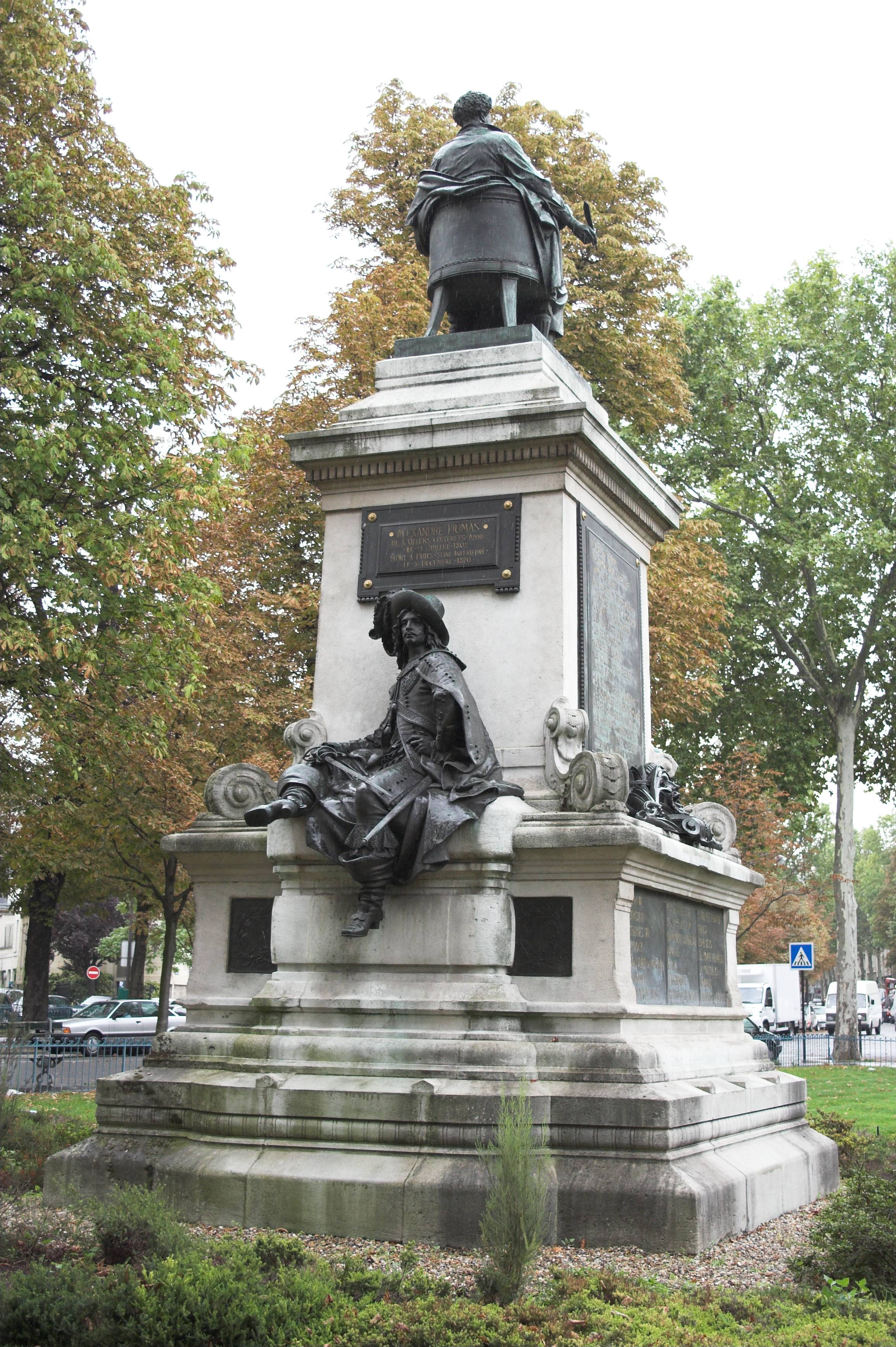 アレクサンドル・デュマ・ペールとダルタニャンの像statue of A. Dumas and d'Artagnan(Paris, France)